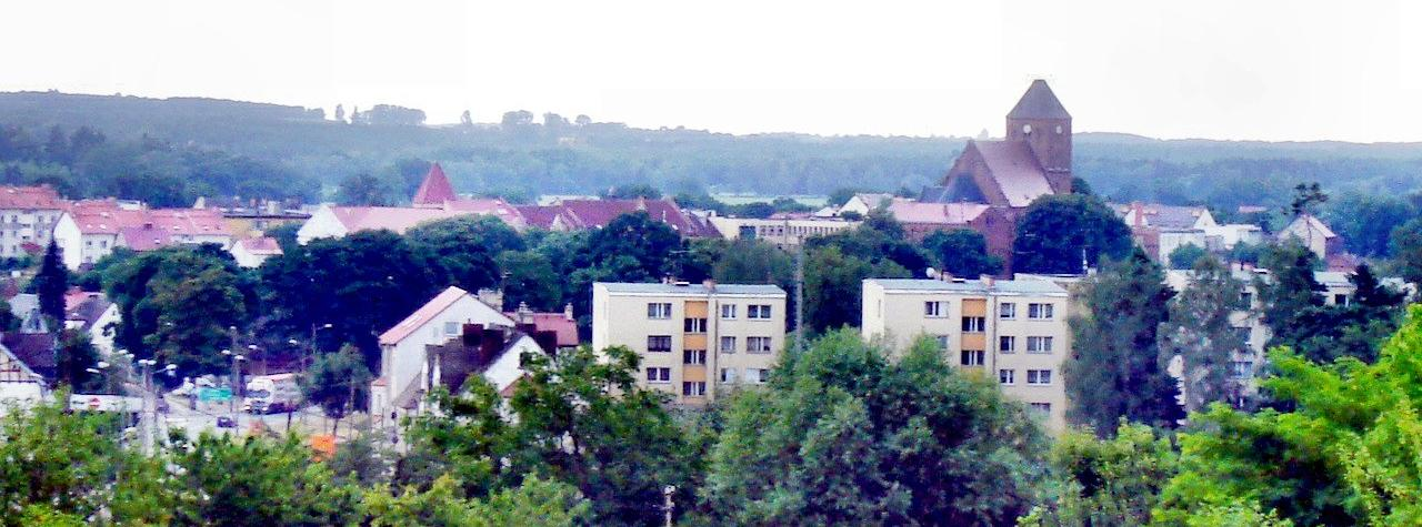 Panorama Recza